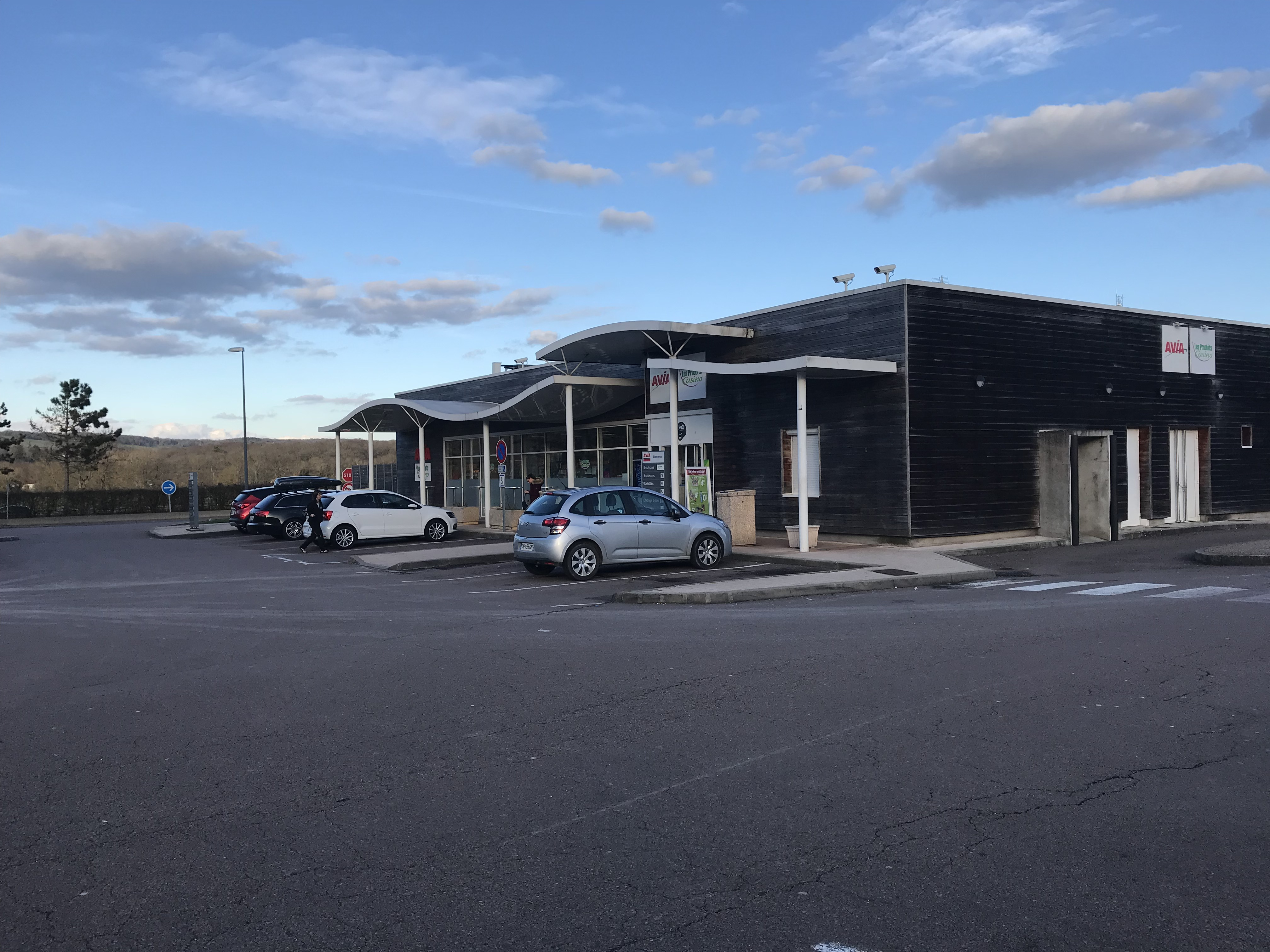 Aire d'autoroute du chien Blanc.